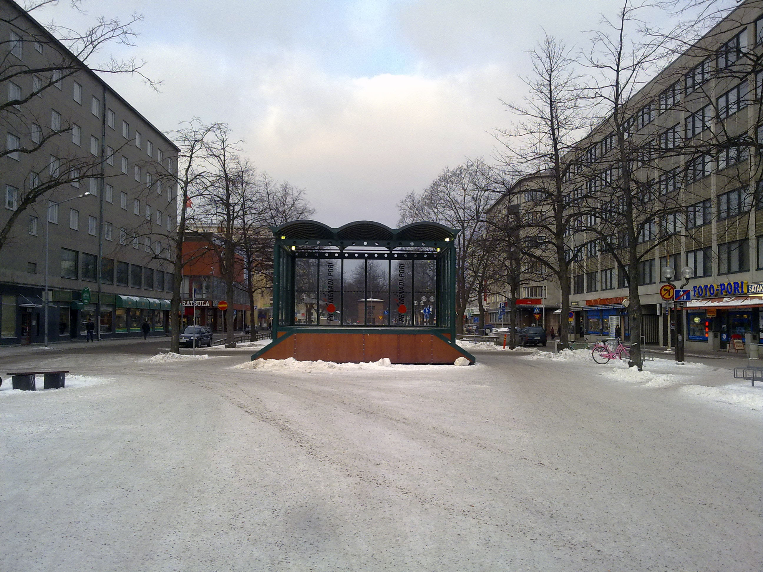 Porissa sijaitseva Eetu Salinin aukio, joka tunnetaan myös nimellä Eetunaukio. Kuvassa Eetunaukion konserttilava.